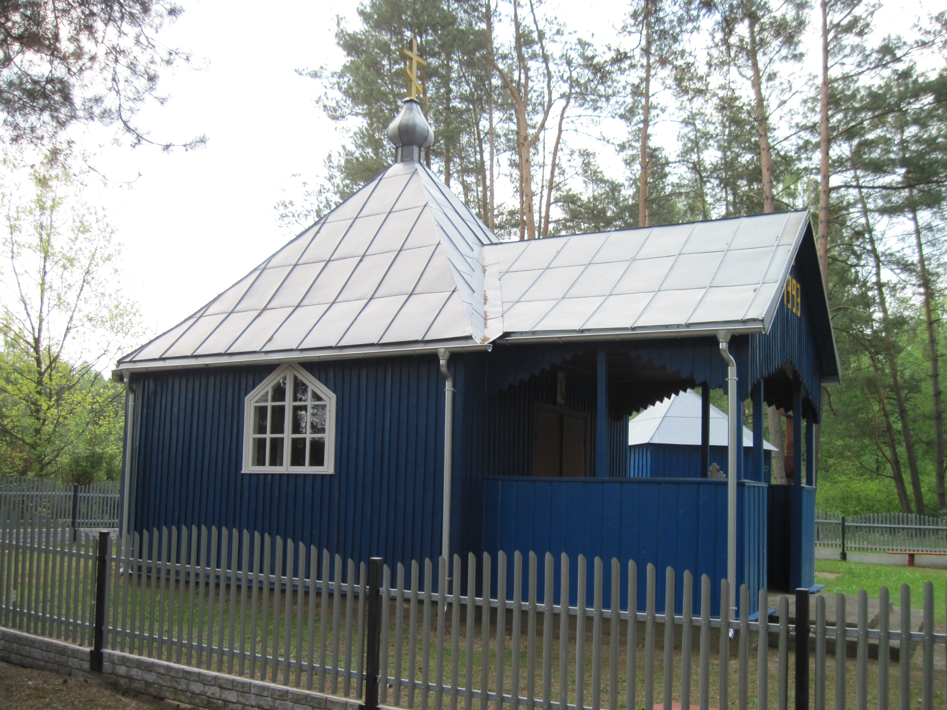 Gredele